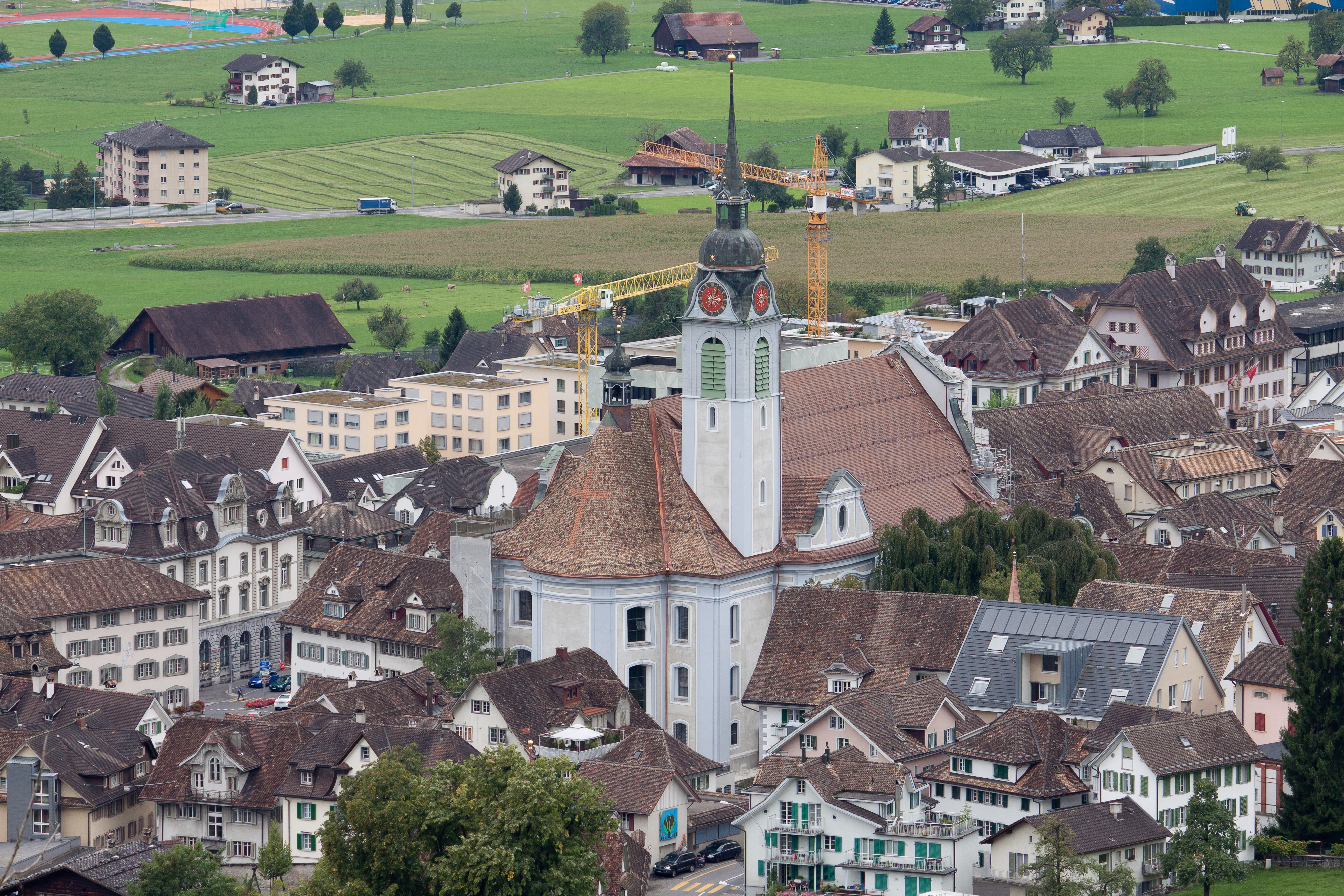 Katholische Pfarrkirche St. Martin, Hauptplatz, Schwyz